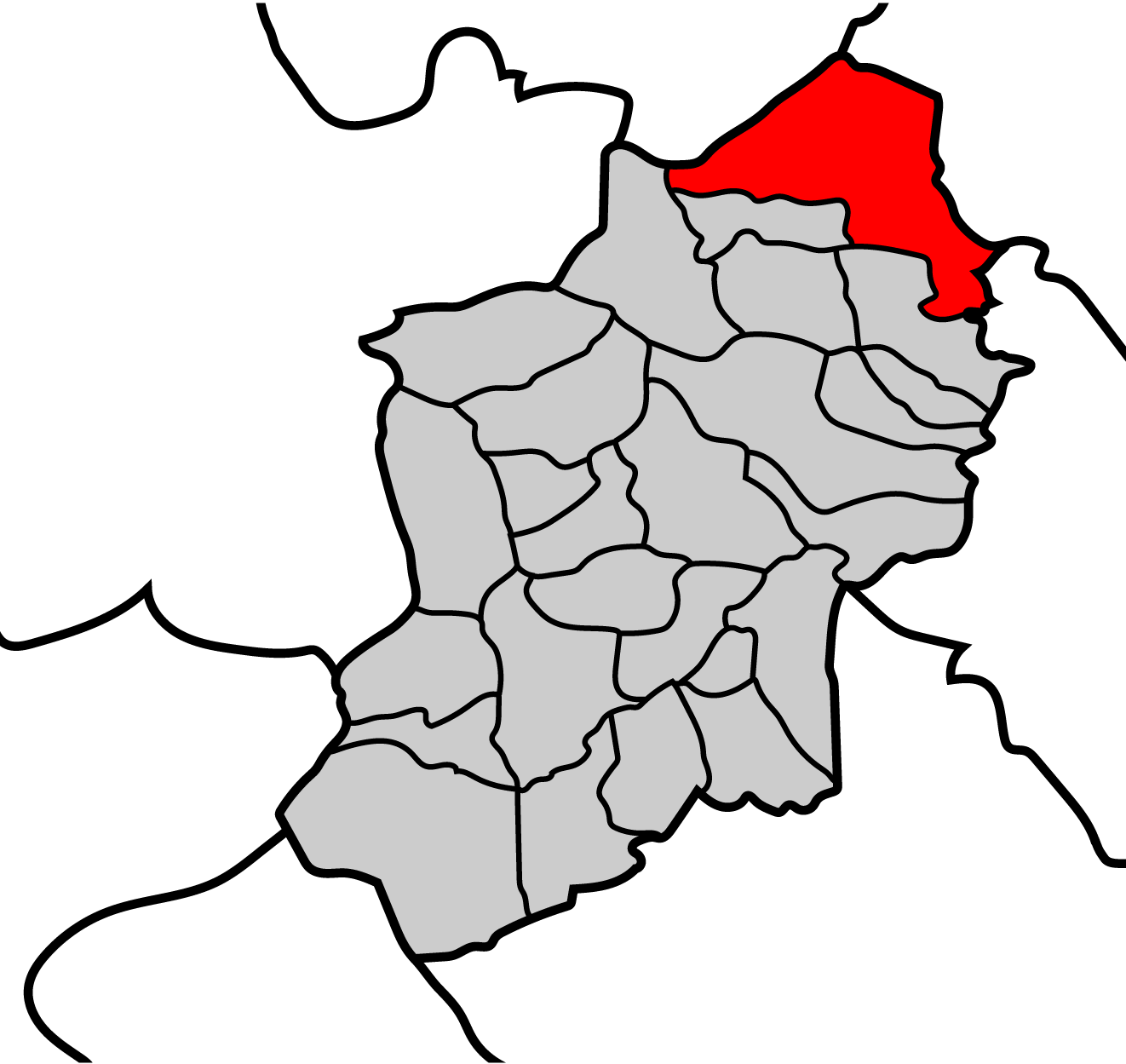 Mapa de la parroquia de Quintá de Cancelada ayuntamiento de Becerreá